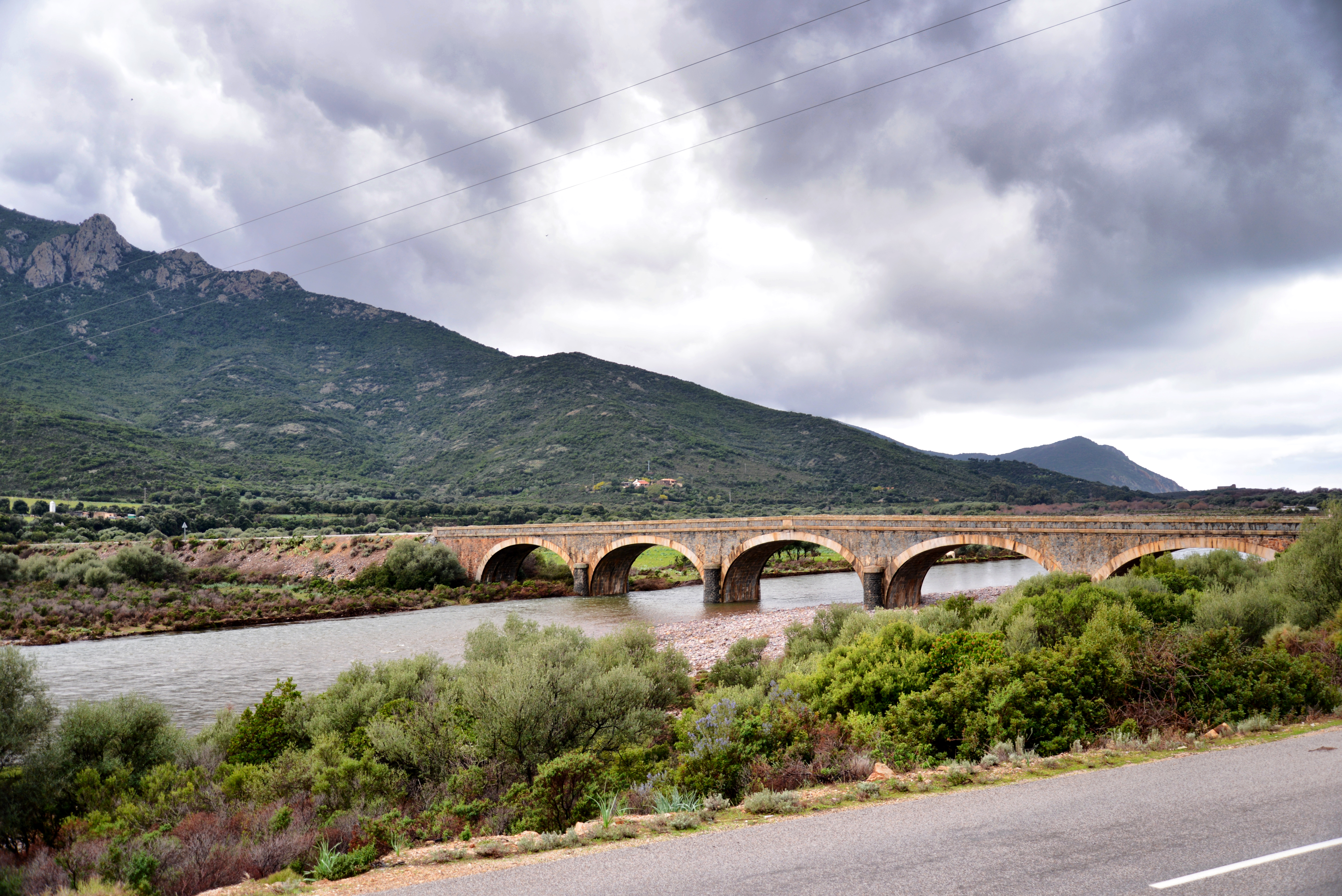 Galéria, Filosorma/Balagne (Corse) - Le Fango au lendemain d'une crue, sous le pont des 5 arcades (route D81)